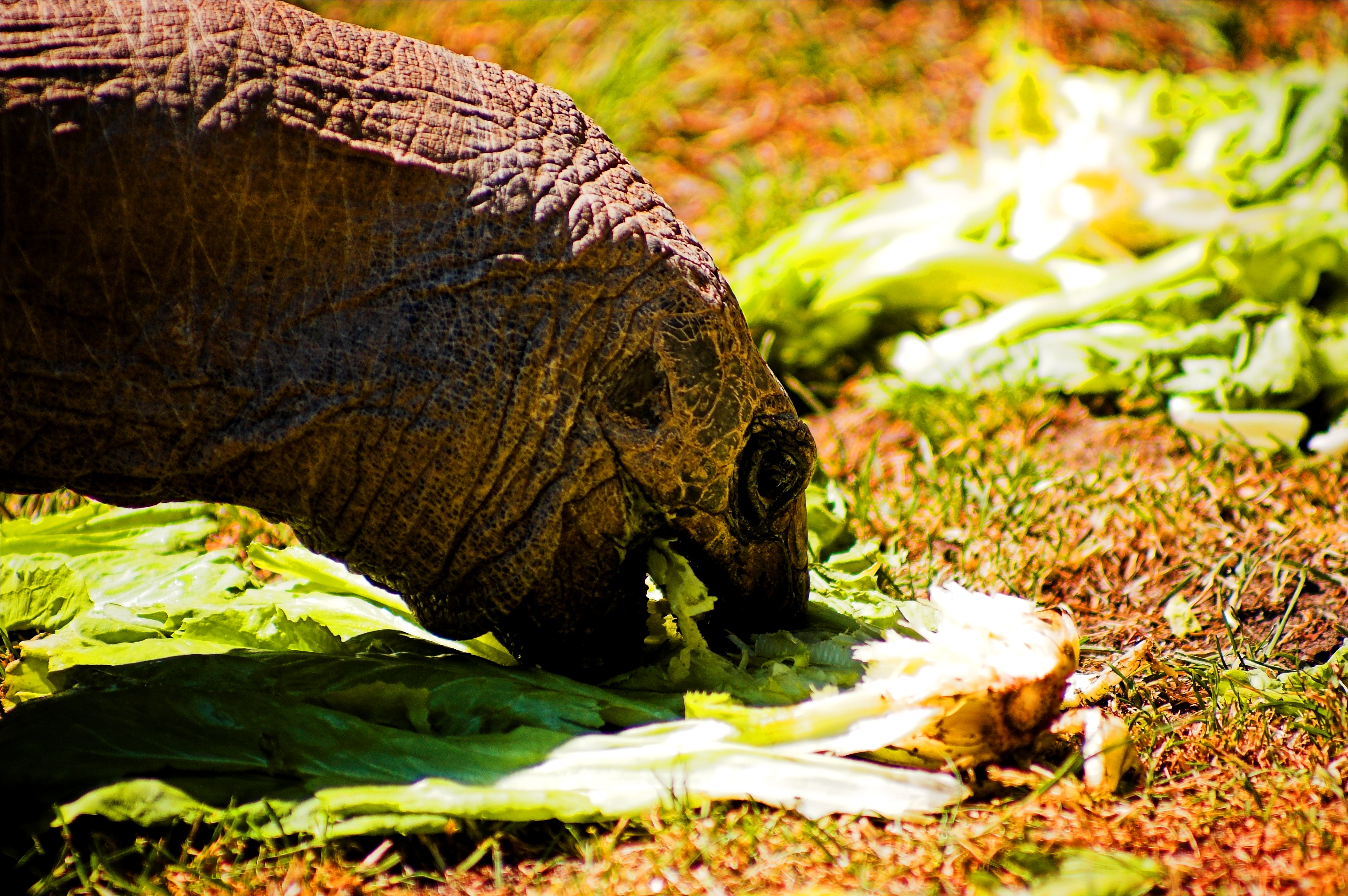 Pictures taken in Artis Zoo, Amsterdam - Nederlands Turtle eating